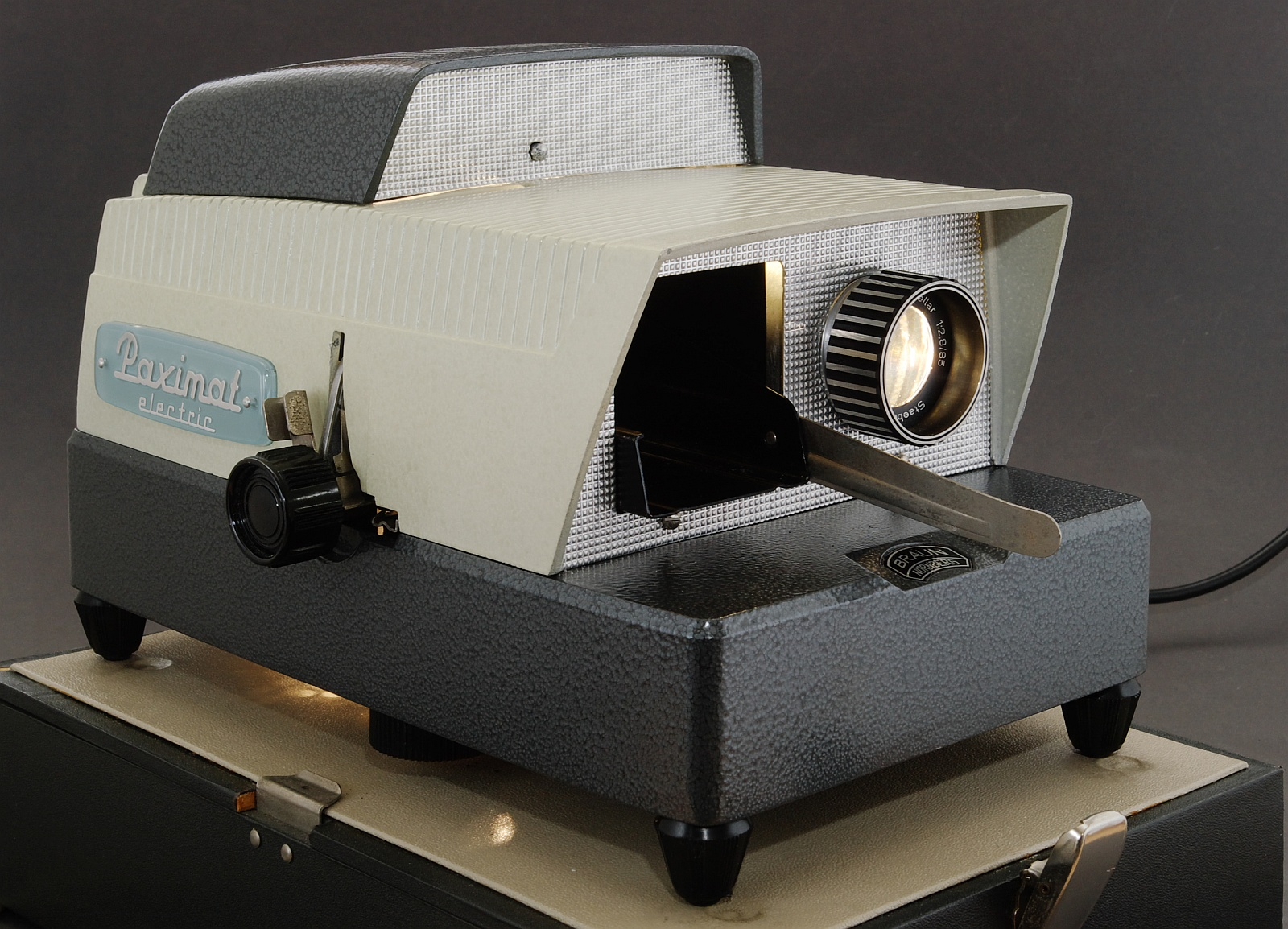 Braun Paximat electric Diaprojektor